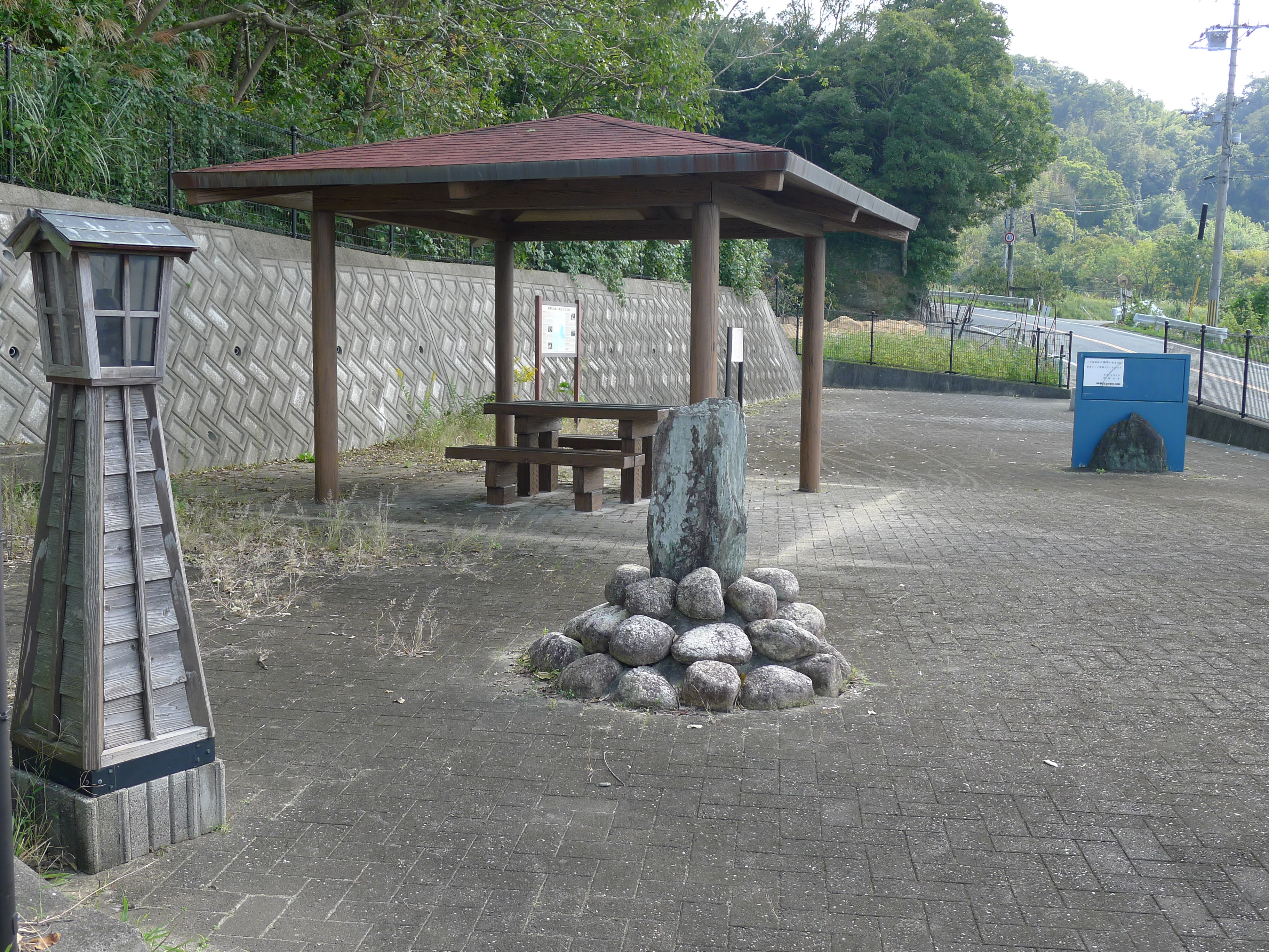 熊野古道・紀伊路の九十九王子の一つ和佐王子（和歌山県和歌山市）、中央の石塔は江戸時代に紀州藩が建てた顕彰碑。四阿があり、紀伊路探訪中に休憩できる（トイレや水道はない）。